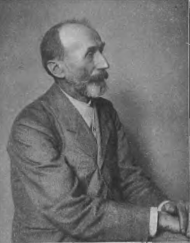 Kazimierz Alchimowicz